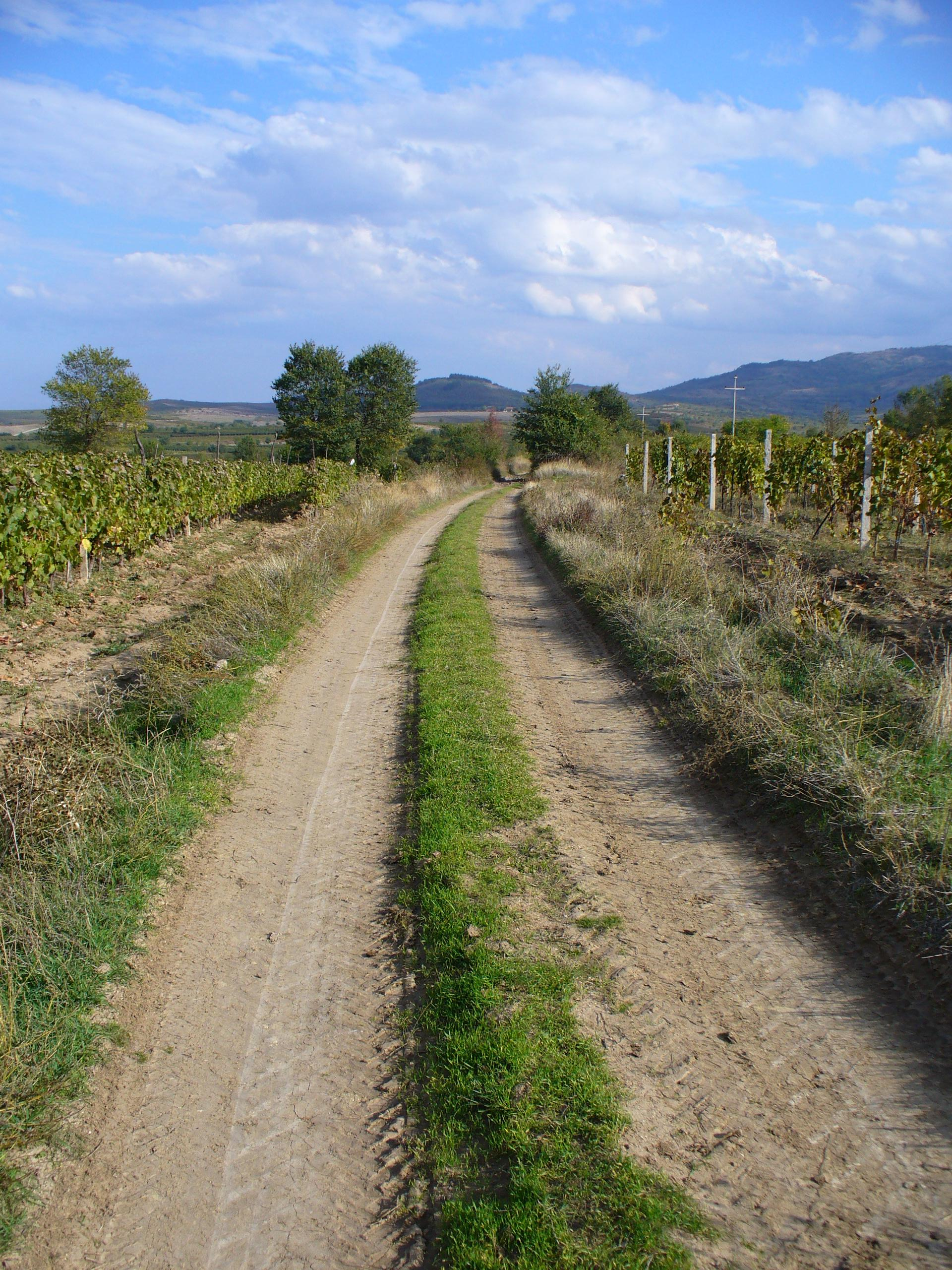 Tikveš, Macedonia